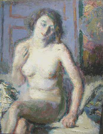 Nu assis